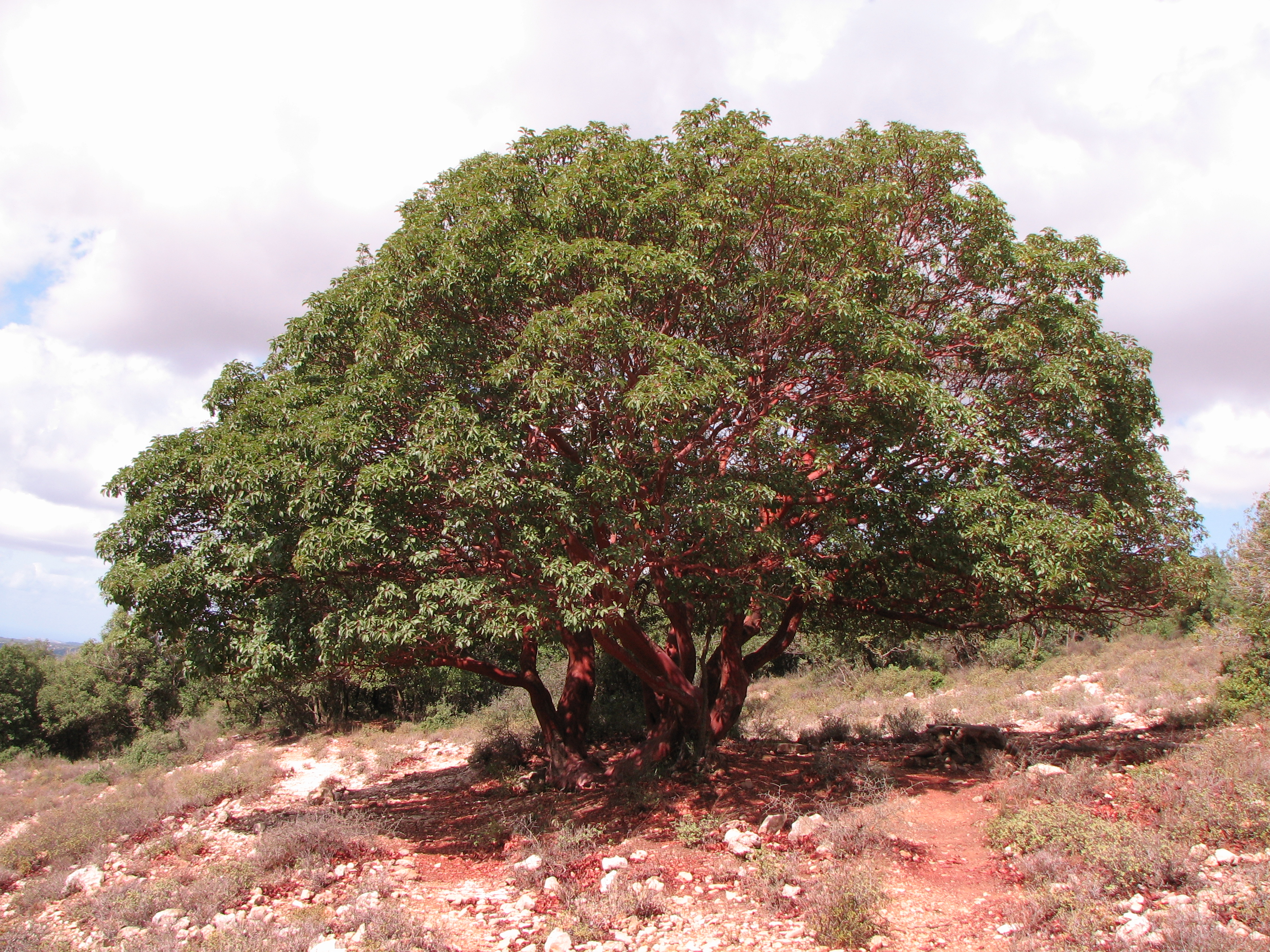 קטלב מצוי בגליל העליון